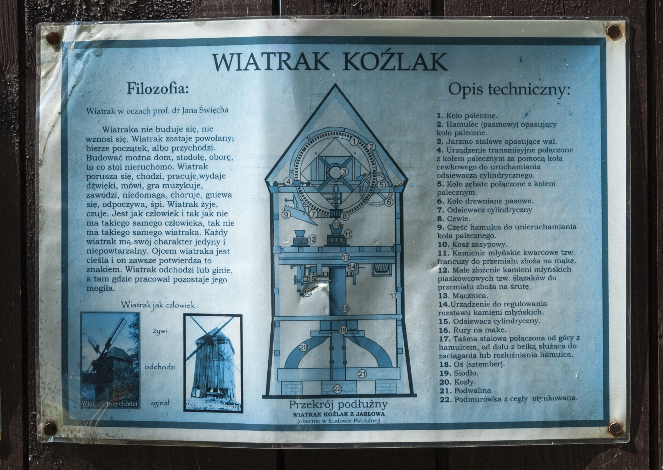 Kudowa-Zdrój - Pstrążna, wieś - układ przestrzenny, XVIII, XX